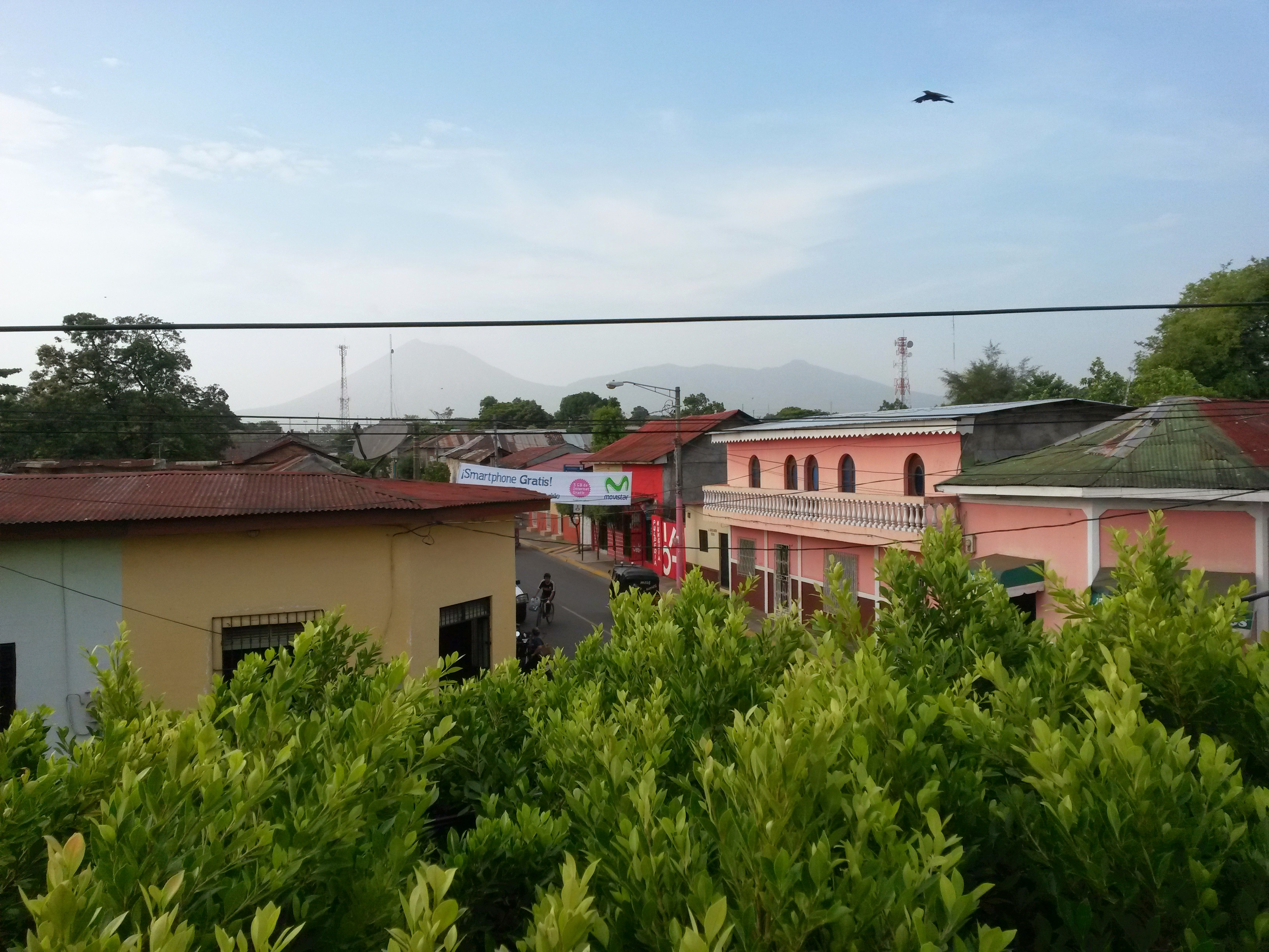 Vista Hacia El Norte El Volcan San Cristobal El Mas Grande Del Pais